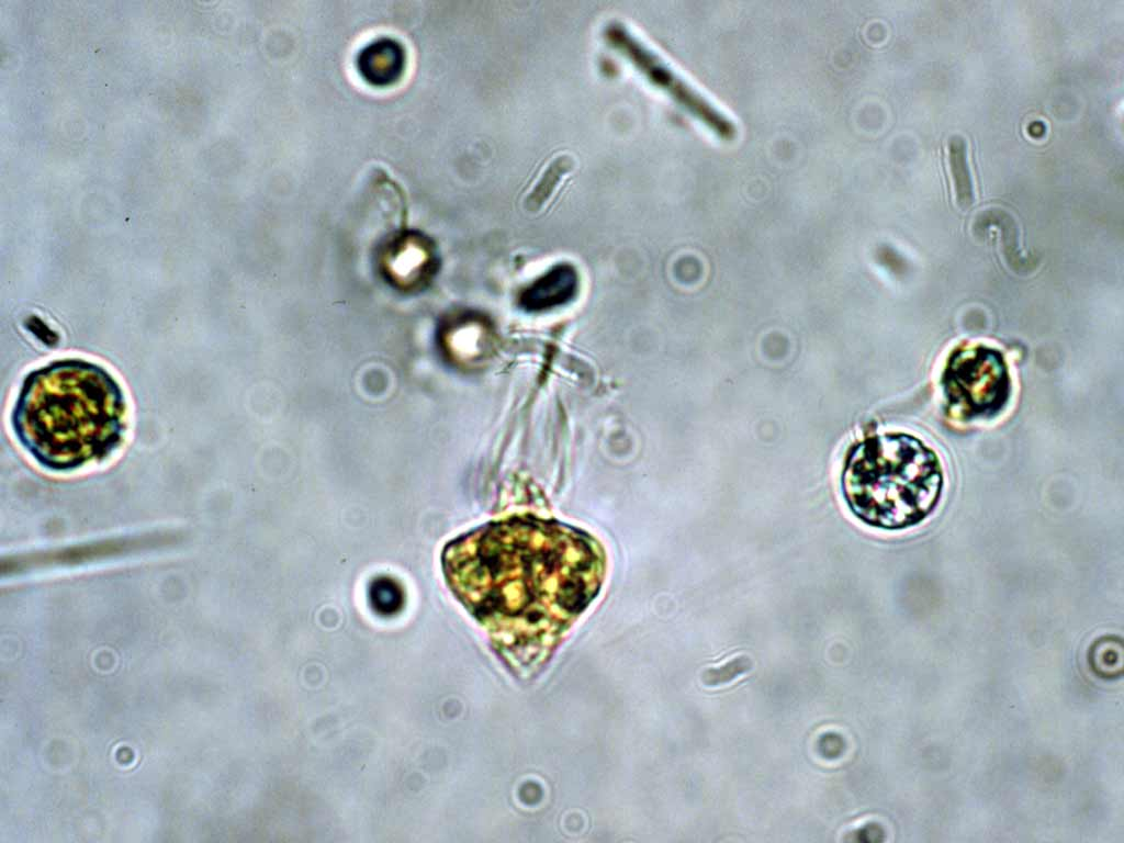 Euglena sp.